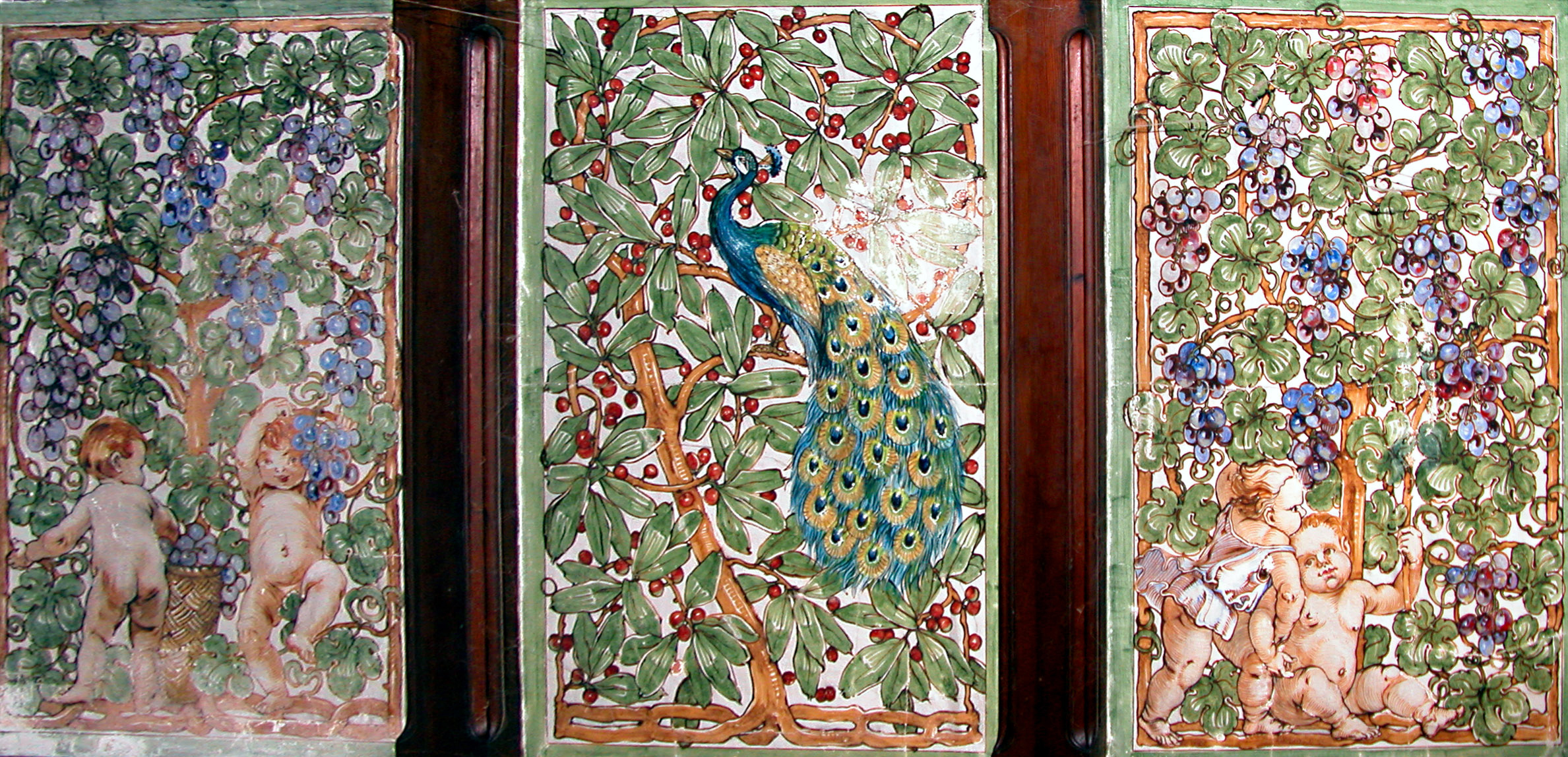 27.10.2005 01445 Radebeul-Oberlößnitz, Eduard-Bilz-Straße 49 (GMP: 51.109885,13.676674): Haus Albertsberg, historisches Weingut. Im 17. Jahrhundert wurde hier ein umfangreicher Weinberg angelegt. Das heute vorhandene, aber mehrfach umgebaute Weinberghaus wurde um 1778 errichtet. Baumeister Moritz Ziller baute es 1862 in eine herrschaftliche Villa um. 1898/99 erfolgt unter dem Dresdner Architekten Oskar Menzel die Barockisierung des Hauses. Bemalte Holzfelderdecke im Erdgeschoß östlich der Hauseingangsdiele. Derzeit in Sanierung. [DSCN7997.TIF]20051027125DR.JPG(c)Blobelt